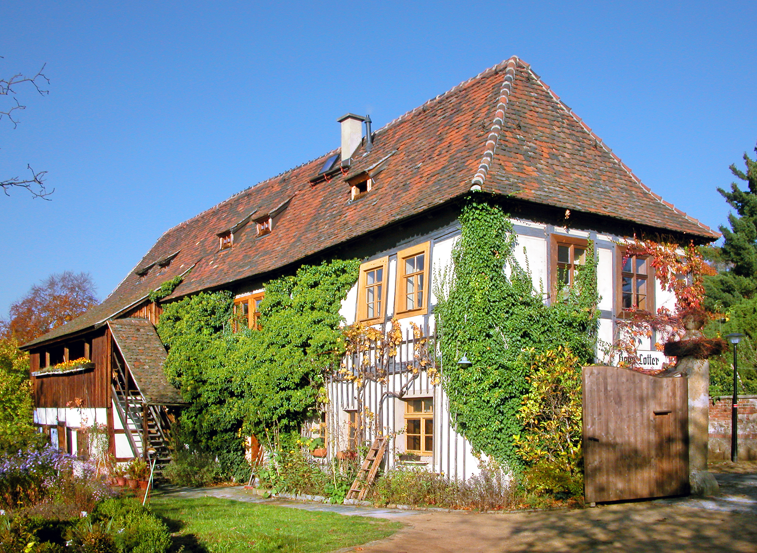 24.10.2008 01445 Radebeul, Winzerstraße 83 (GMP: 51.112519,13.630315): Haus Lotter, altes Weingut. [DSCN34962.TIF]20081024090DR.JPG(c)Blobelt